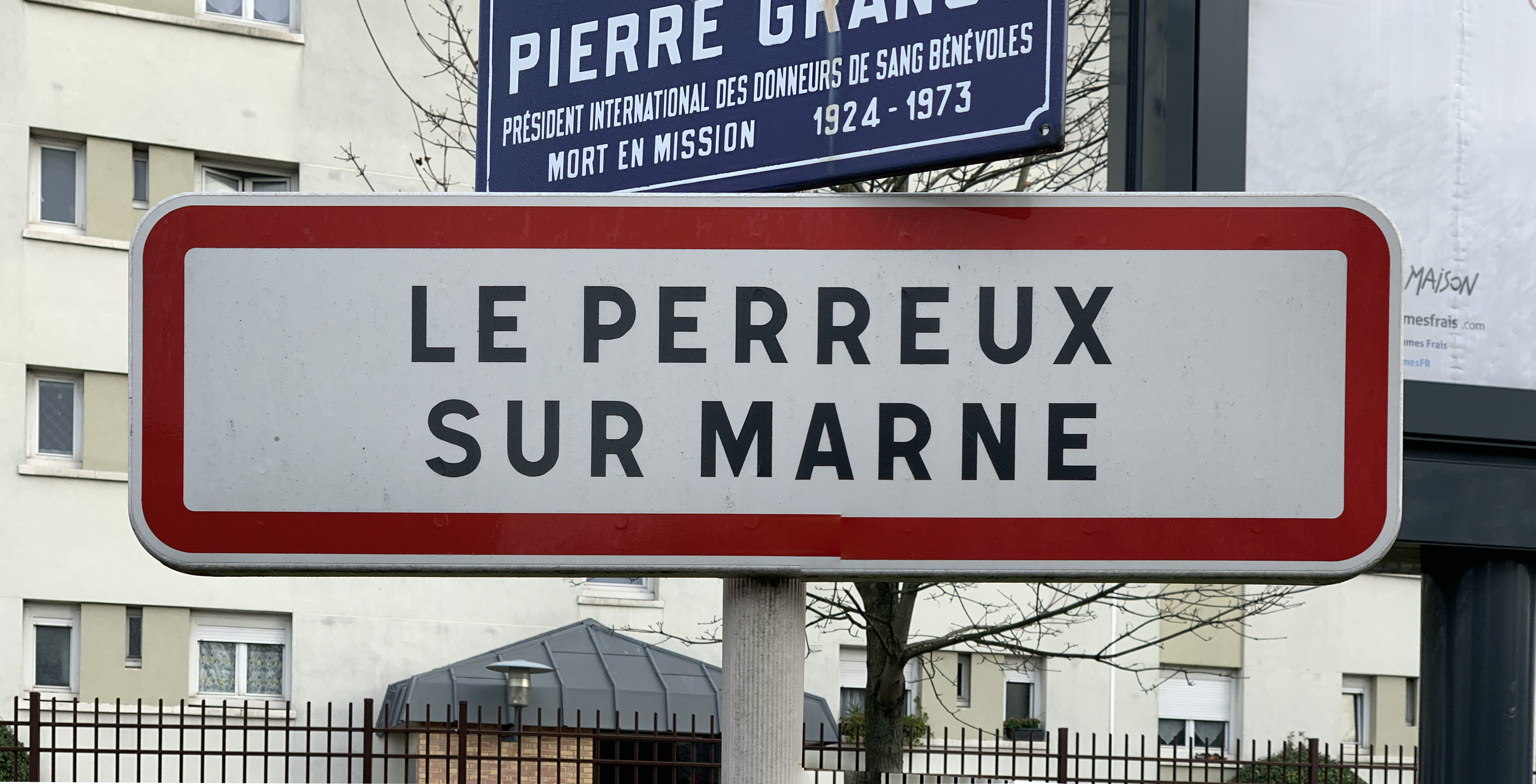 Panneau d'entrée dans Le Perreux-sur-Marne.